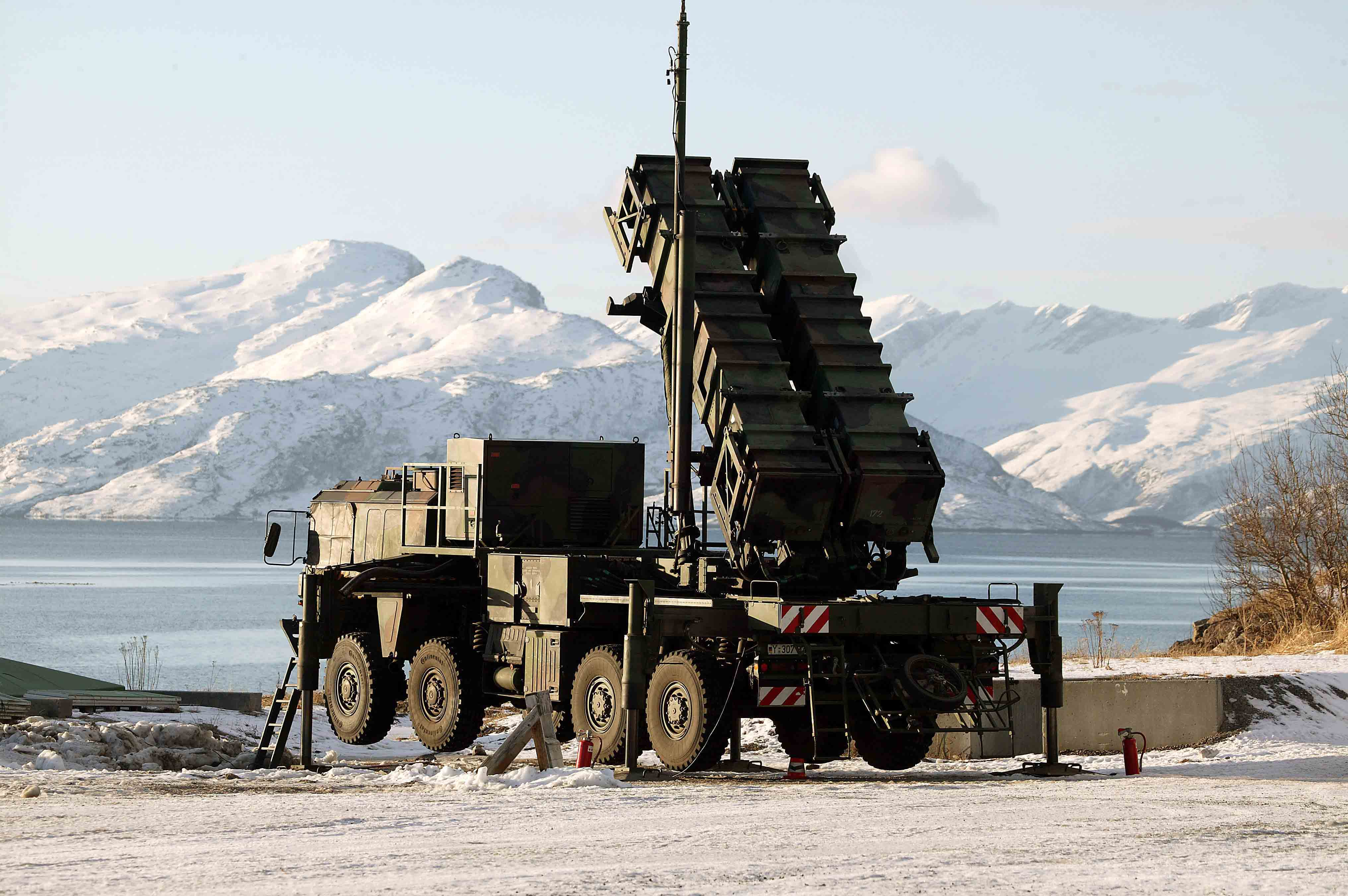 Flugabwehrraketensystem PATRIOT. Startgerät mit vier Lenkflugkörpern, Bekämpfungsreichweite circa 80 km. Die Besonderheit an der Radartechnik ist der Zusammenschluss mehrerer Radargeräte, welche auf ein Antennensystem zurückgreifen können, dessen Antennen sich nicht drehen, sondern deren Richtstrahlen abgelenkt werden (phasengesteuert). Außerdem wird automatisch Freund und Feind unterschieden und eine Bedrohlichkeitseinstufung durchgeführt. ©Bundeswehr/Freude